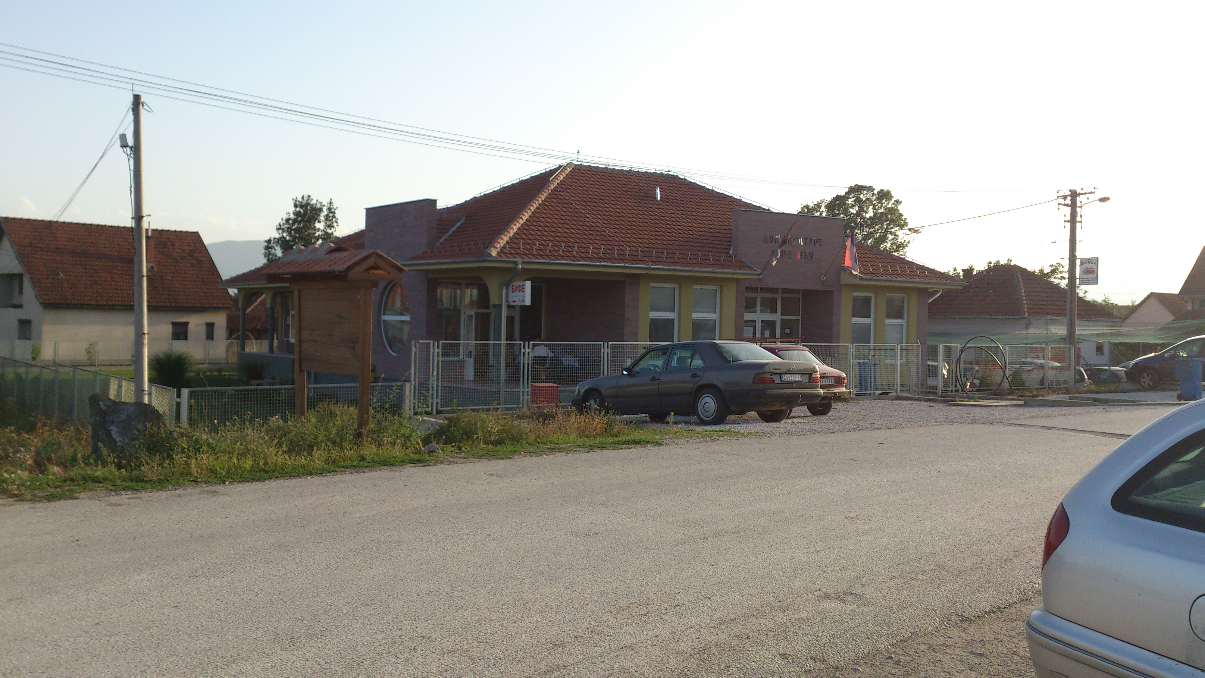 Дом културе у Коњевићима.